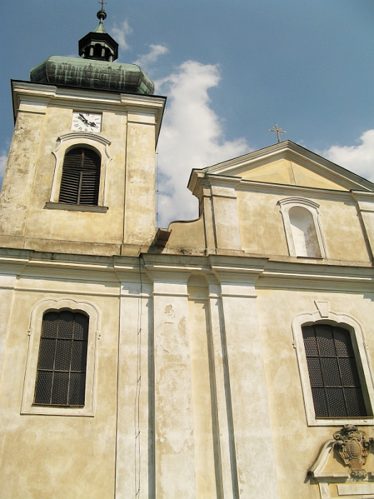 Kostel svaté Máří Magdaleny, parc. 1, 2, 6, Zubrnice.